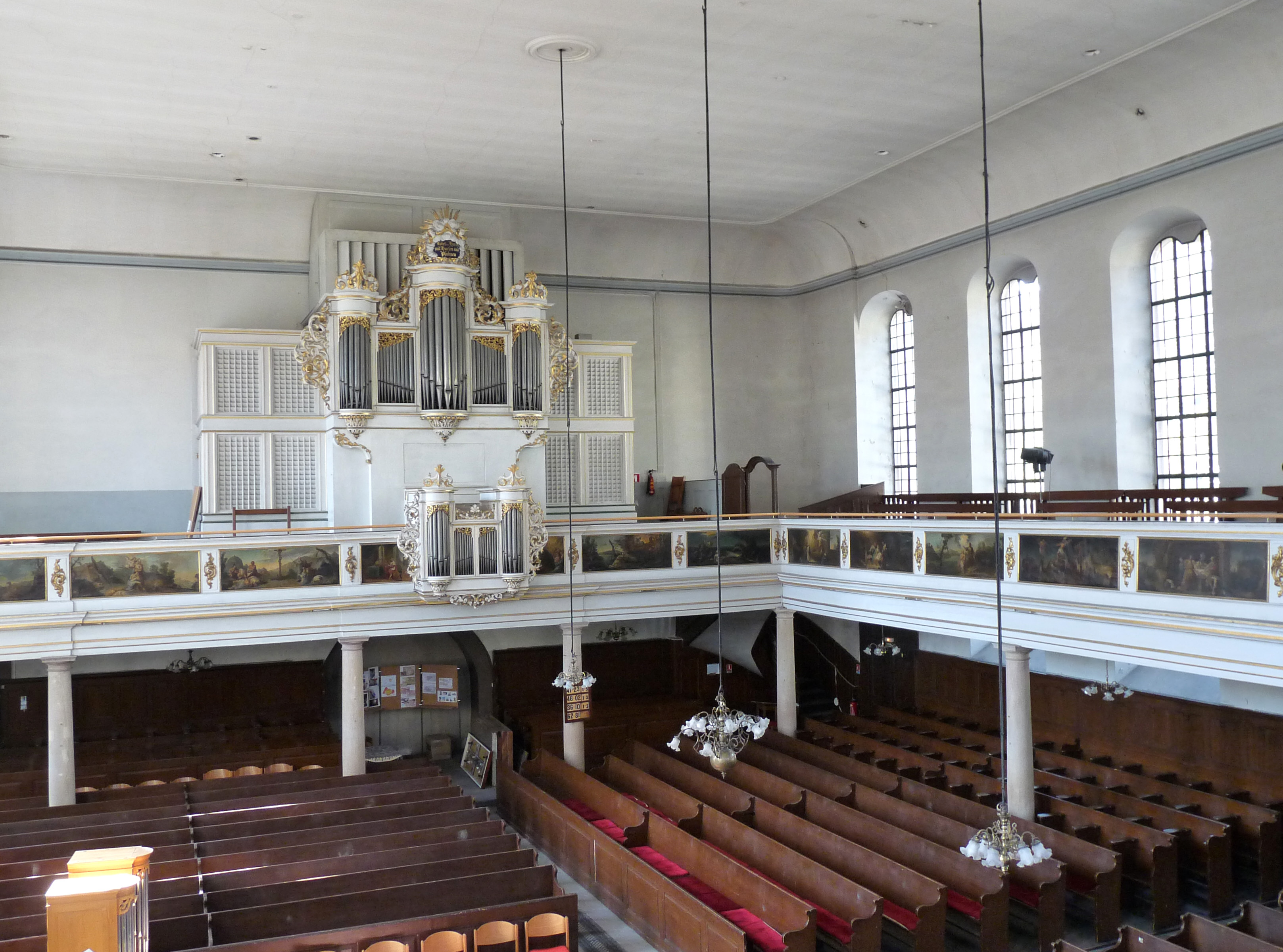 Eglise Sainte-Aurélie de Strasbourg : orgue réalisé par Andreas Silbermann en 1718, plusieurs fois remanié depuis (dont Ernest Muhleisen, 1952), buffet peint en blanc et or en 1790. Panneaux peints par Pierre Joseph Noël en 1767 (scènes de l'Ancien Testament sous l'orgue, du Nouveau Testament à droite)